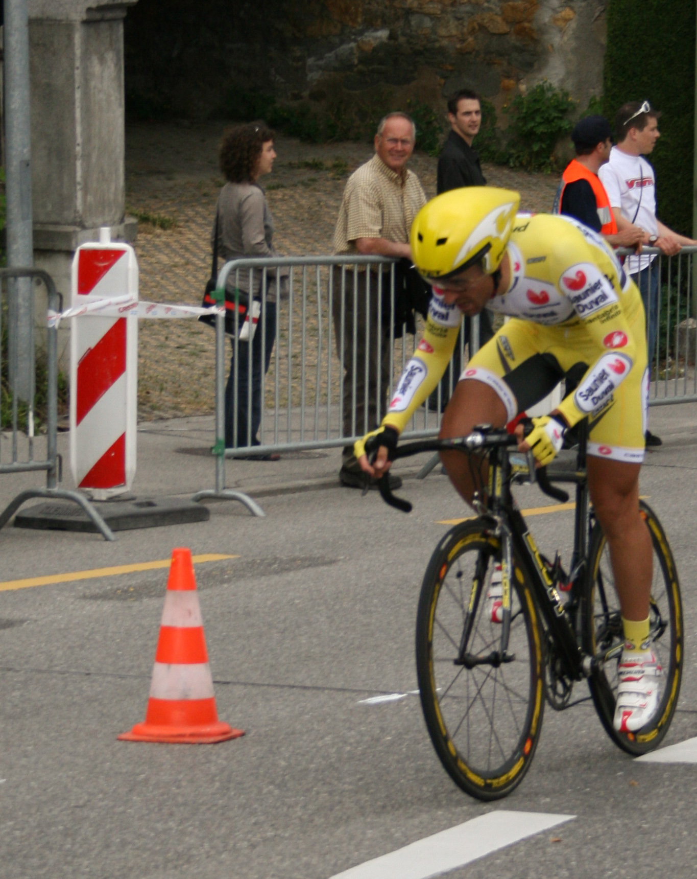 Guido Trentin prologue du Tour de Romandie 2007